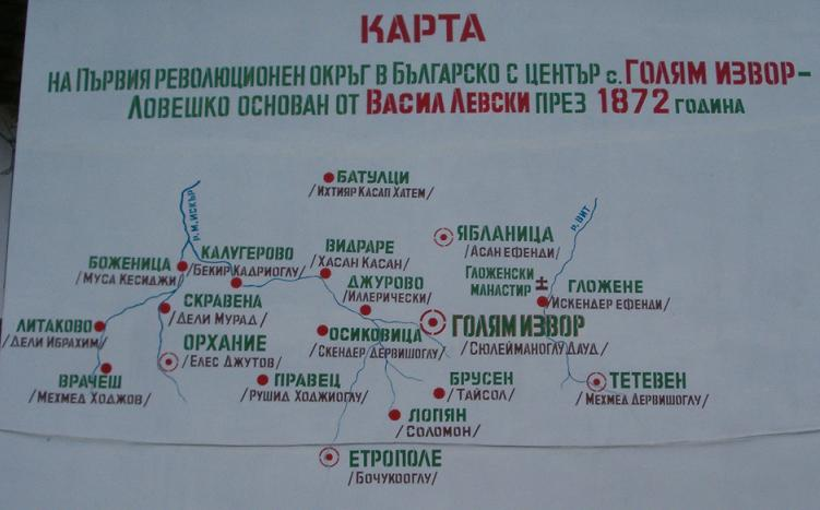 MAP